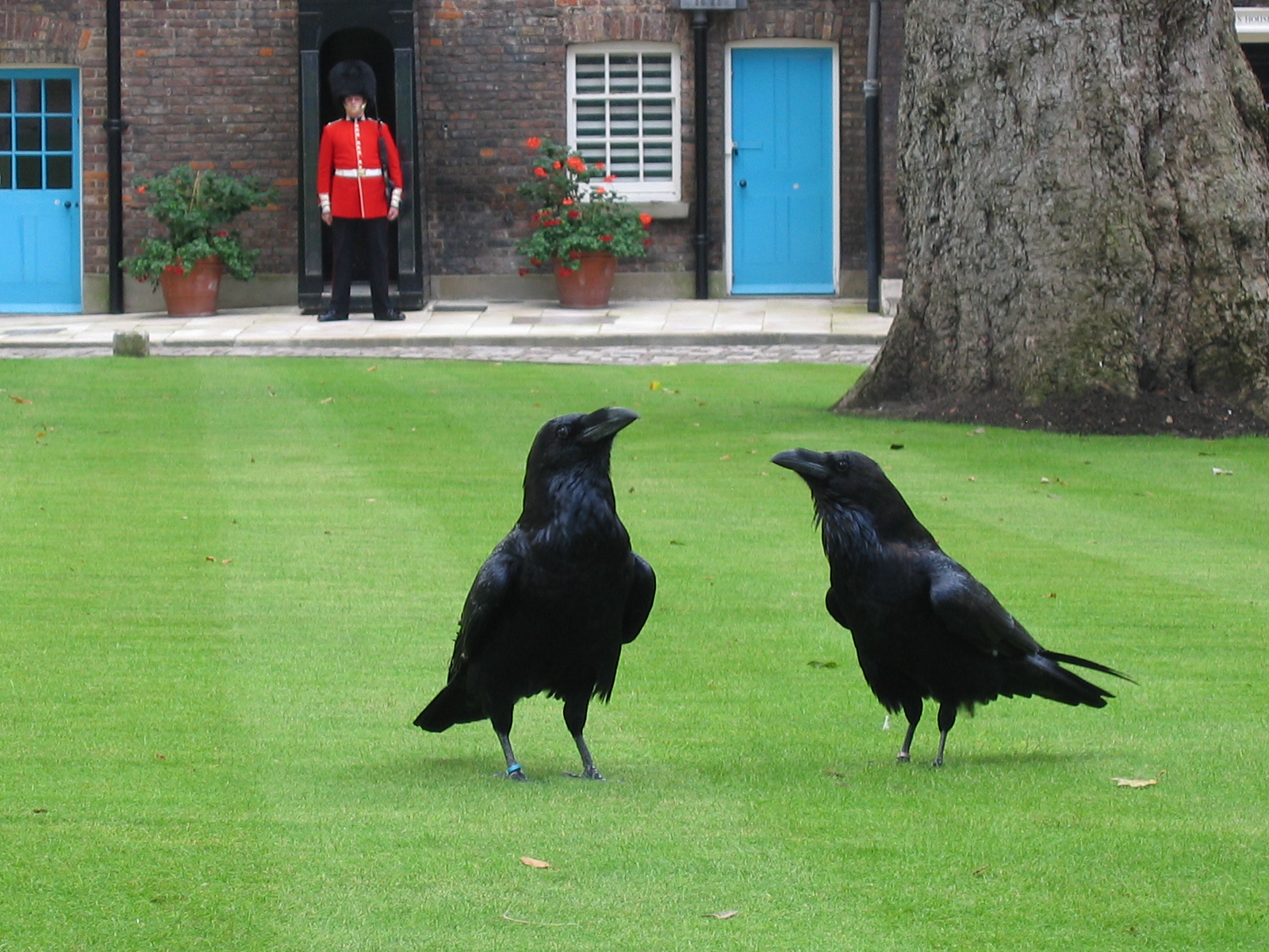 Die Tower-Raben in London - es handelt sich um Kolkraben (Corvus corax)